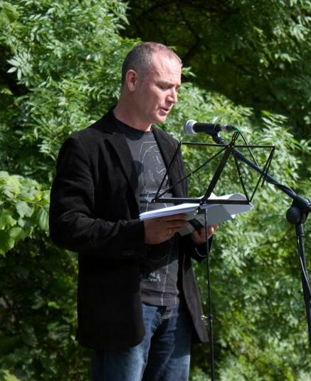 El escritor y poeta en idioma asturianu Xuan Bello